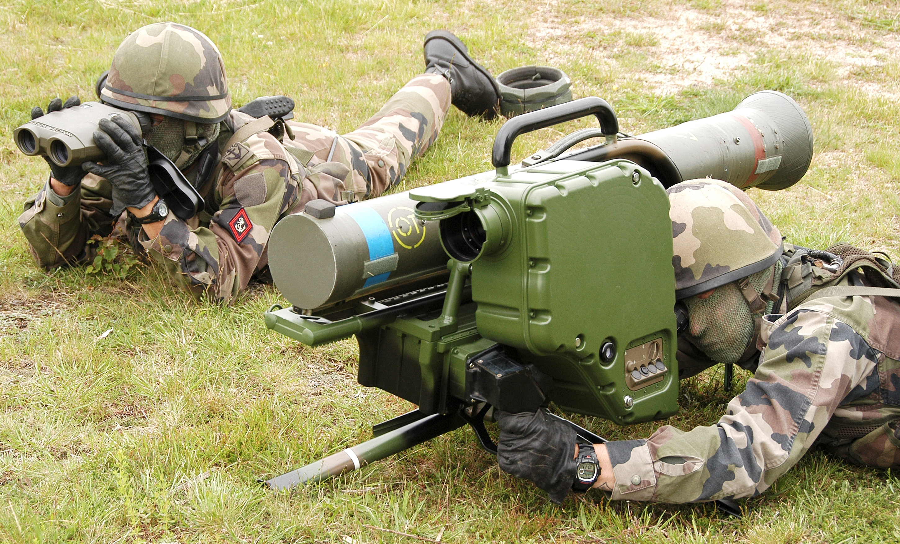 MILAN ADT-ER - Neueste Generation des Waffensystems MILAN; Présentation d'un poste de tir Milan ER par l'armée de terre française.